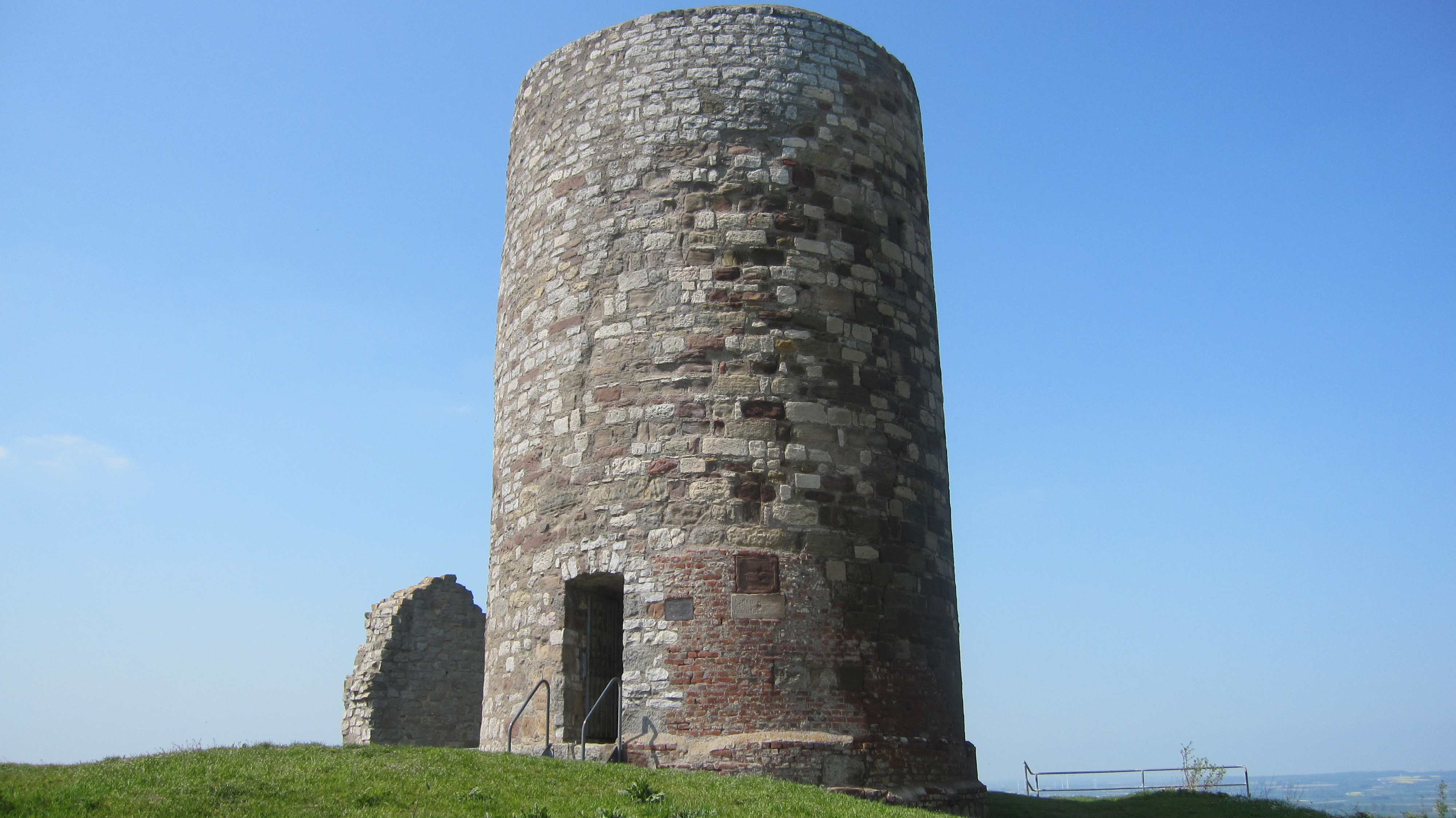 Bergfried der Ruine Burg Desenberg auf dem Desenberg bei Warburg.